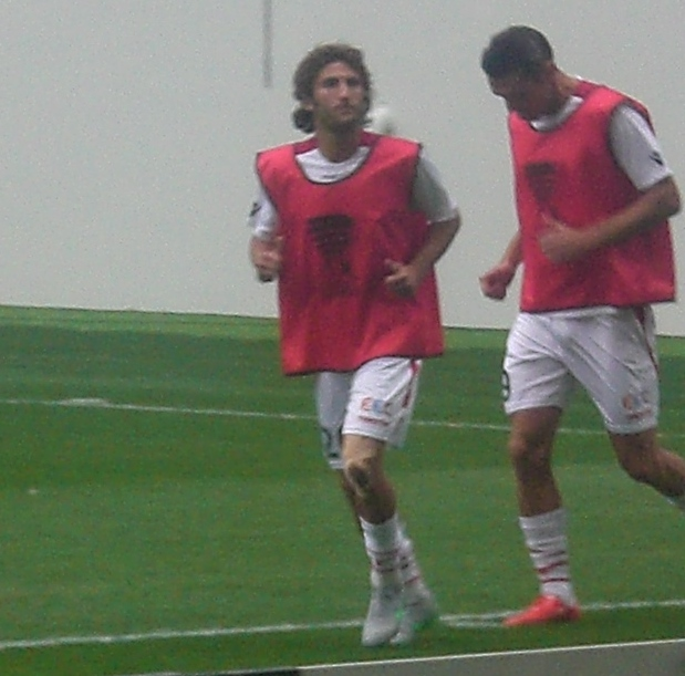 Anthony Lippini (#20 ; au premier plan) et Nicolas Fauvergne (#9 ; au second plan) avant le match Lens / AC Ajaccio, le 11 août 2015, au Stade Bollaert-Delelis, comptant pour le premier tour de la Coupe de la Ligue française de football.